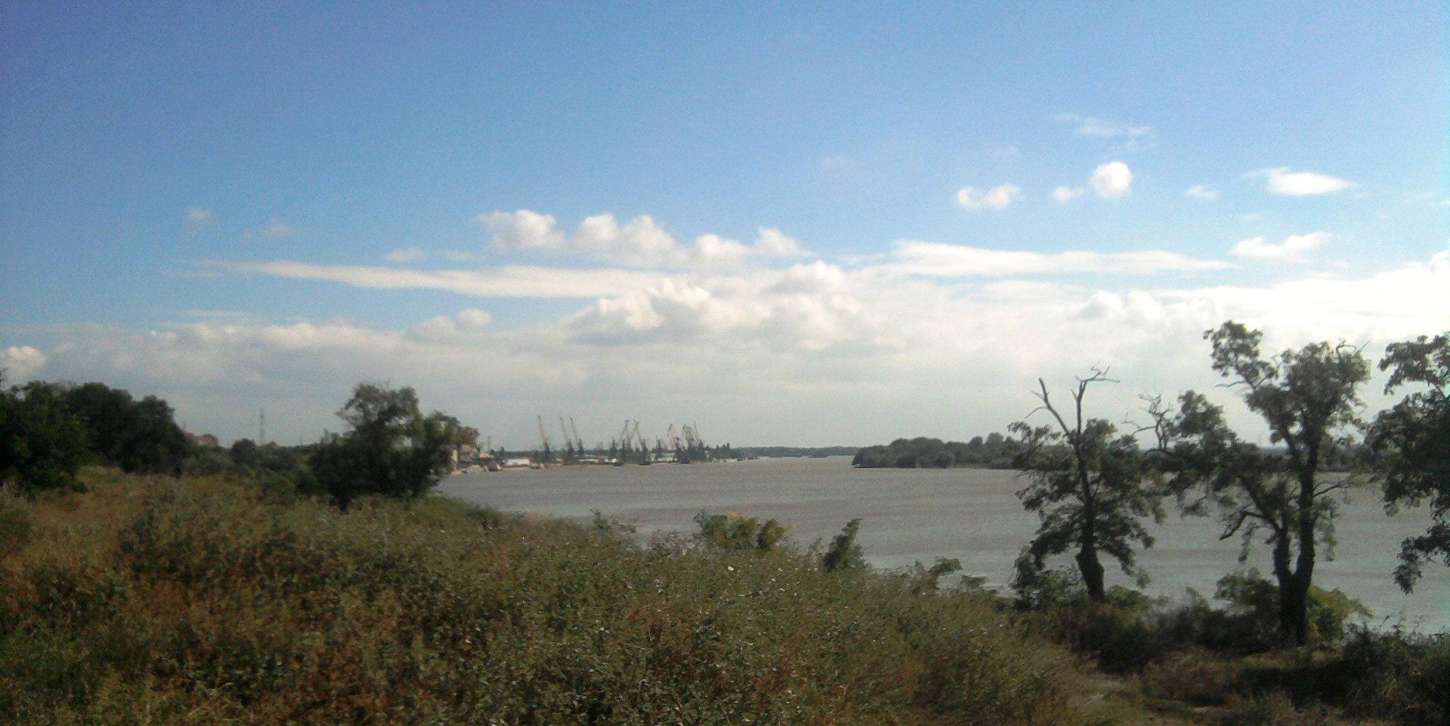 Вікіекспедиція у Буджак